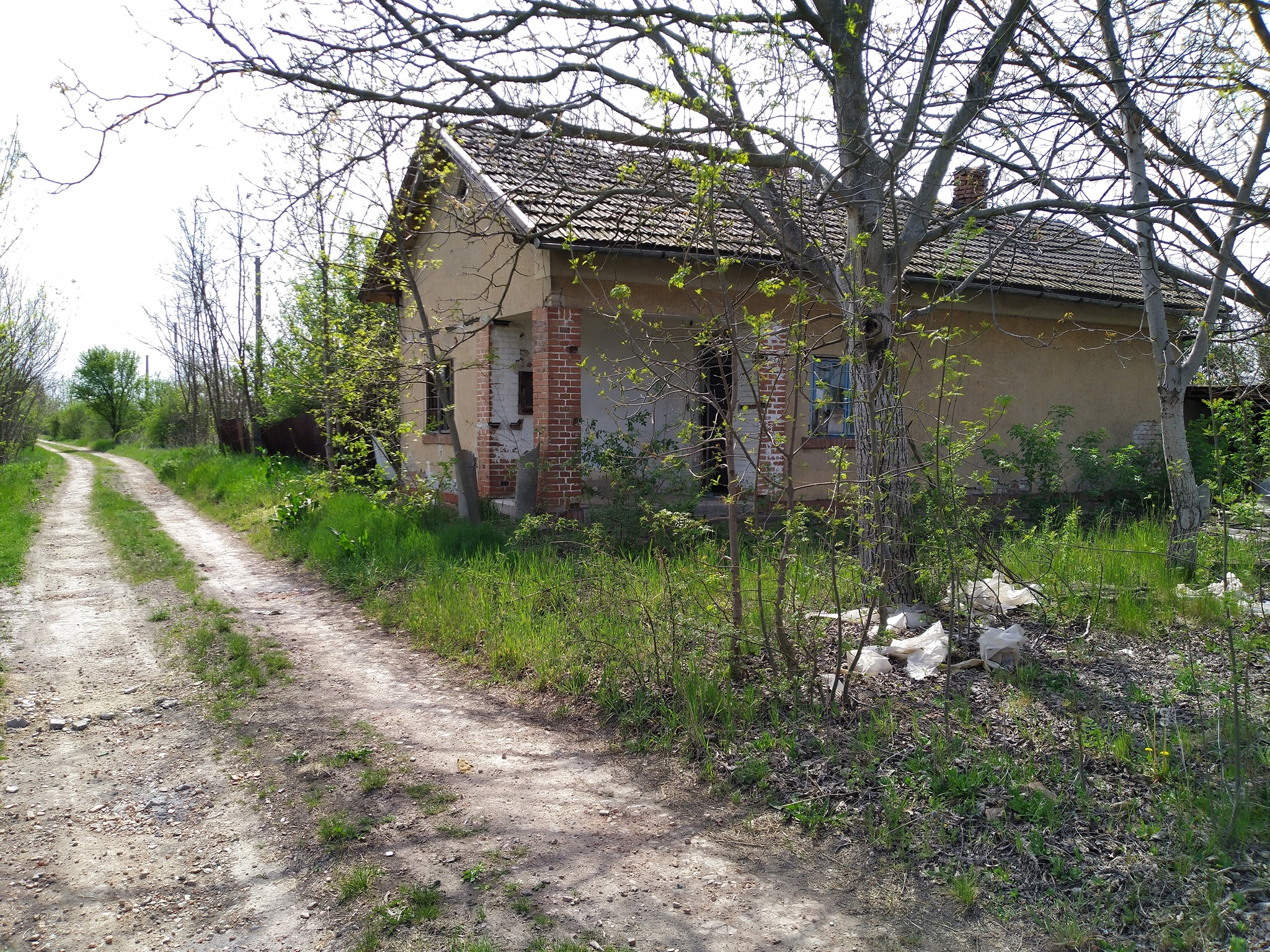 Vedresháza megállóhely épülete elhagyatva 2020-ban.